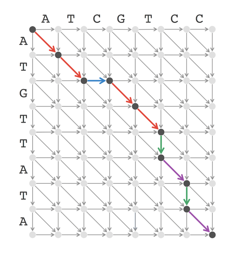 همتراز سازی دو رشته